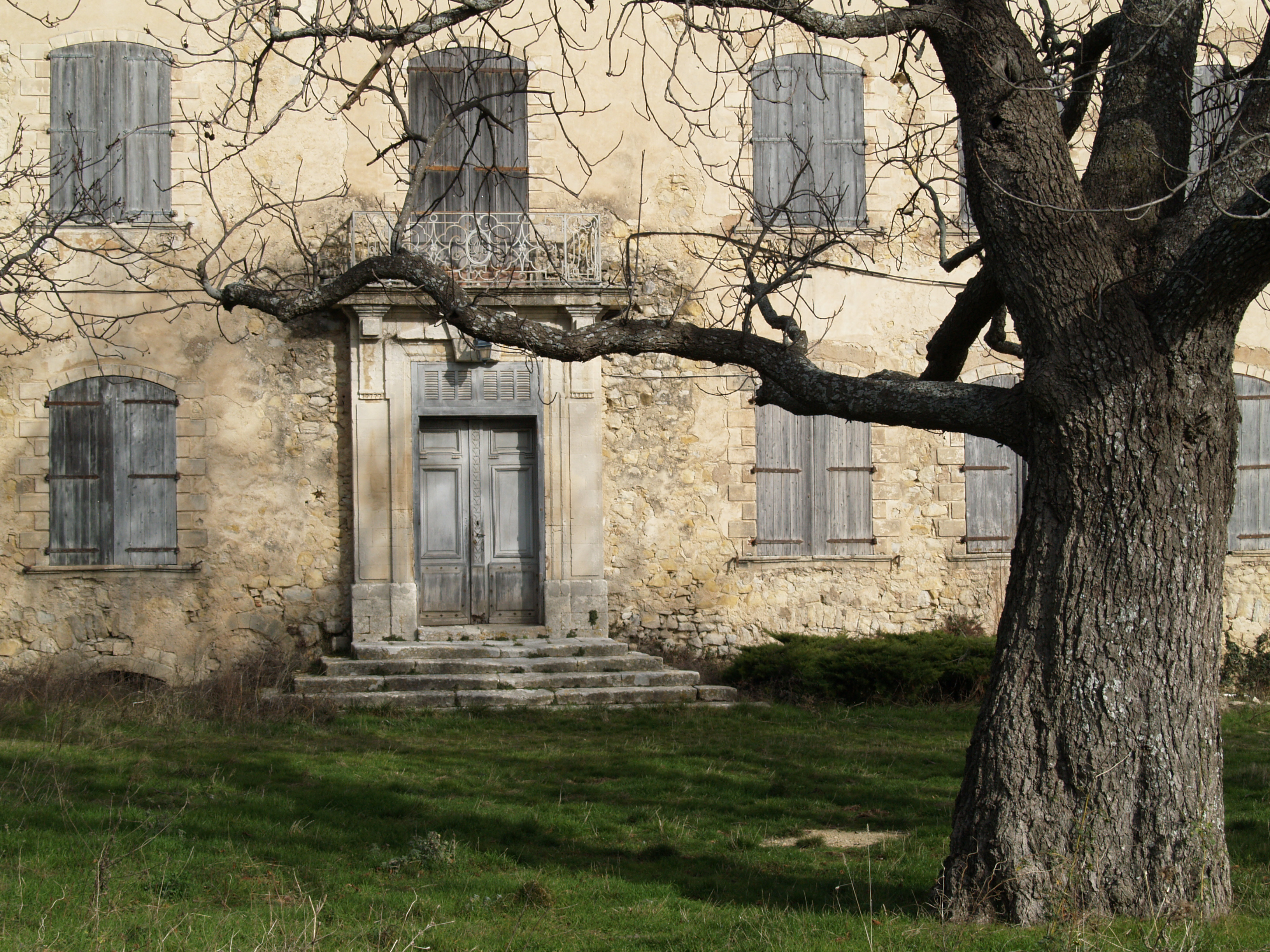 Chateau du grand pré entrée principale - Vitrolles en Luberon